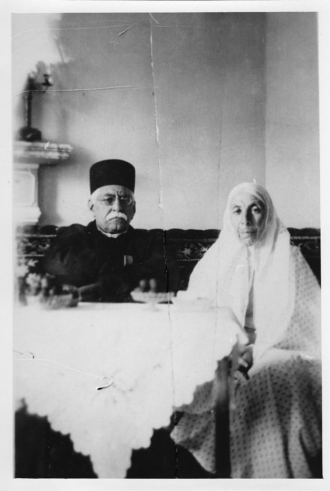 عبدالحسین میرزا فرمانفرما به همراه خواهرش ملکتاج نجمالسلطنه (مادر محمد مصدق) در خانه نجمالسلطنه